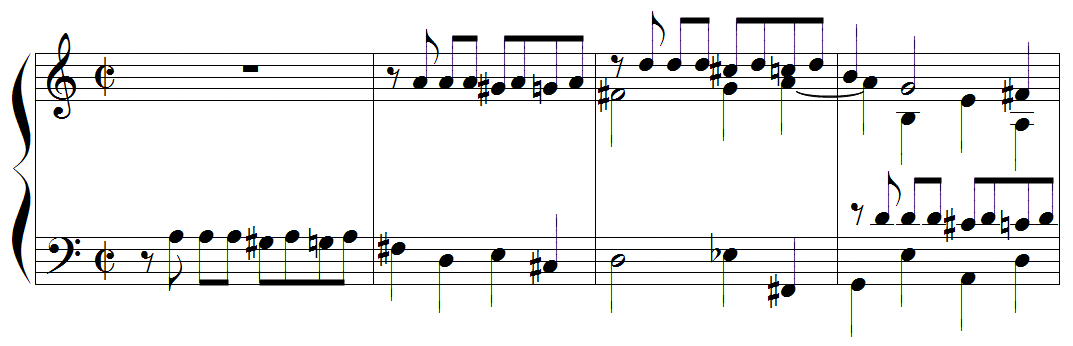 Anton Reicha - sujet de la fugue n°17 des 36 fugues, op.36